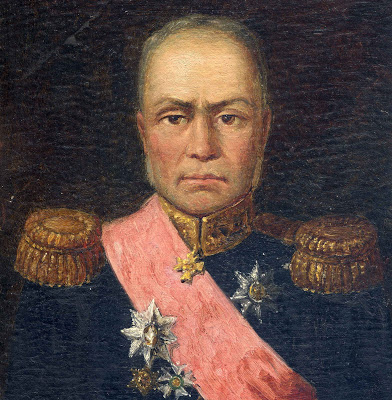 Général Jacques-Alexandre Fabre (1782-1844)